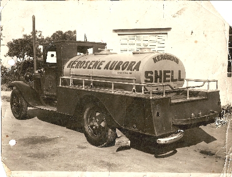 Camión de distribución de kerosene de Carlos Ureta (cc 1940), frente a su casa en San Martín y Francia, partido de San Martín, Bs.As., Argentina